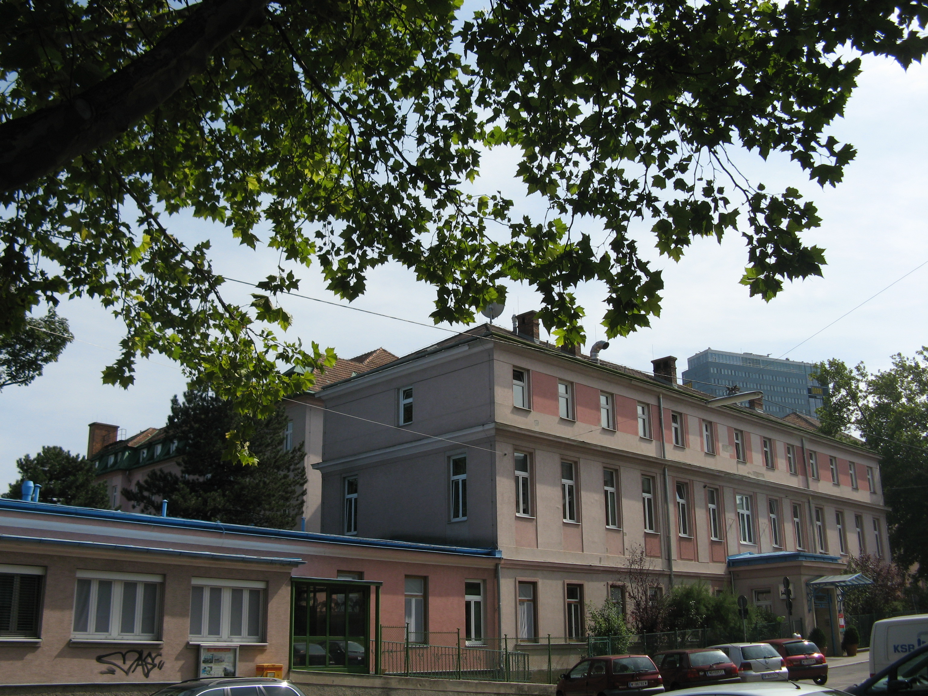 Preyersches Kinderspital (1905-1908), Schrankenberggasse 31, Wien-Favoriten